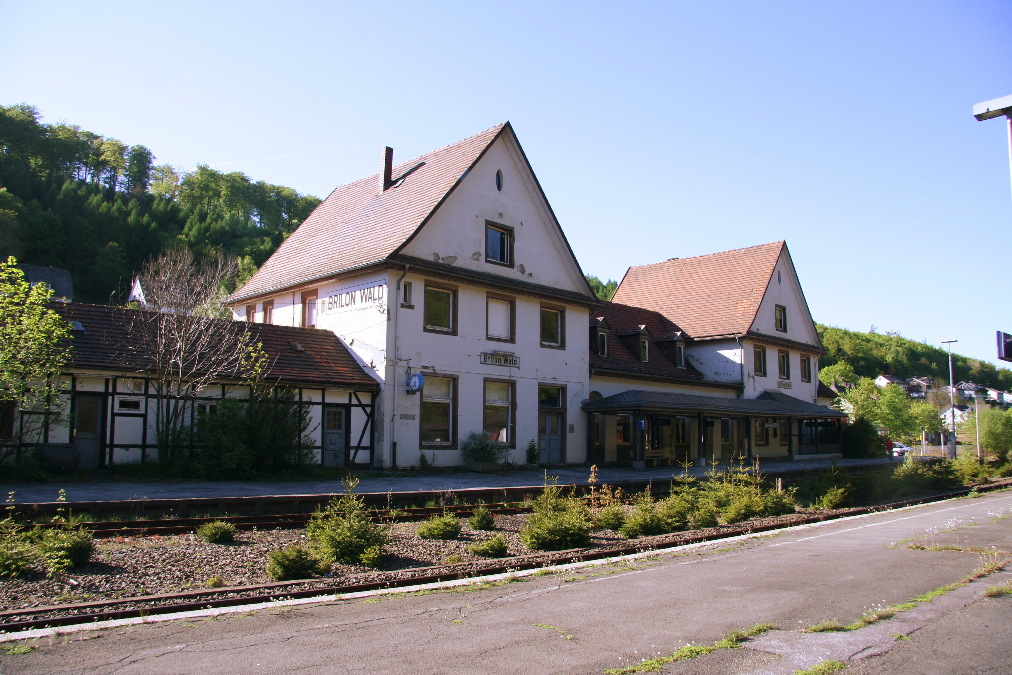 Bahnhofsgebäude des Bahnhofs Brilon-Wald (Gleisseite) This image shows a heritage building in Germany, located in the North Rhine-Westphalian city Brilon-Wald.